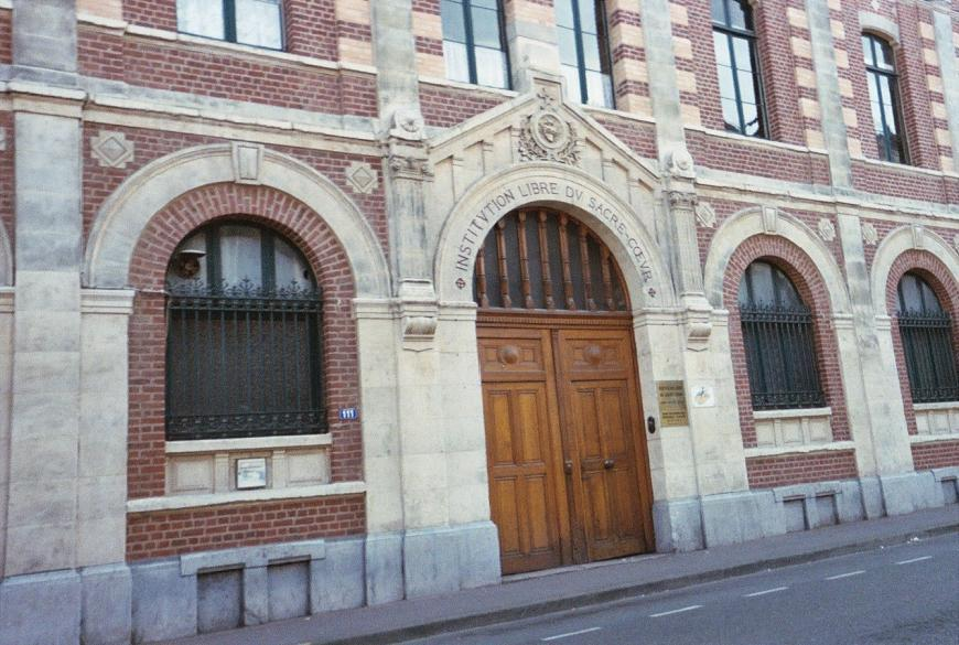 Entrée officielle de l'Institution Libre du Sacré-Coeur (établissement fondé en 1666 par les Pères Récollets; voir l'article sur la Wikipédia francophone).